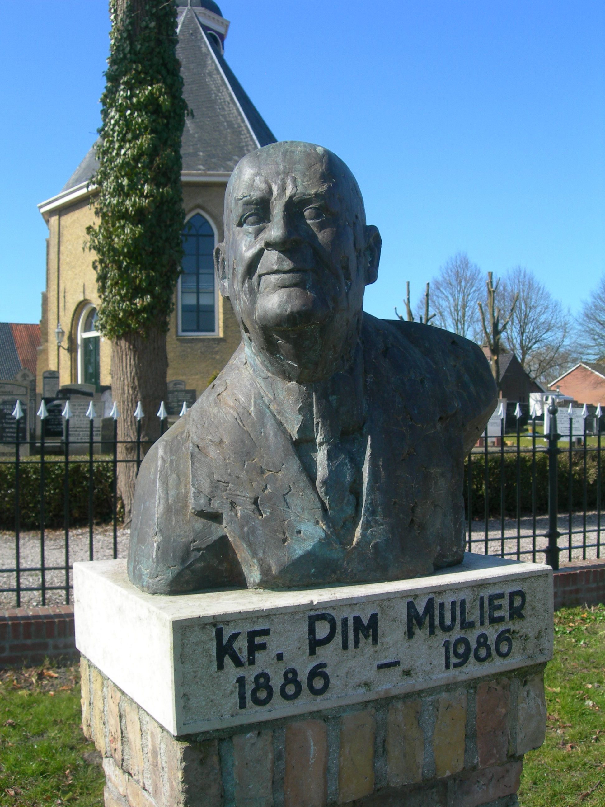 Pim Mulier door Frank Zeilstra in Witmarsum